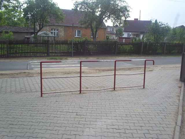 Barierki w Gimnazjum w Chrośnicy